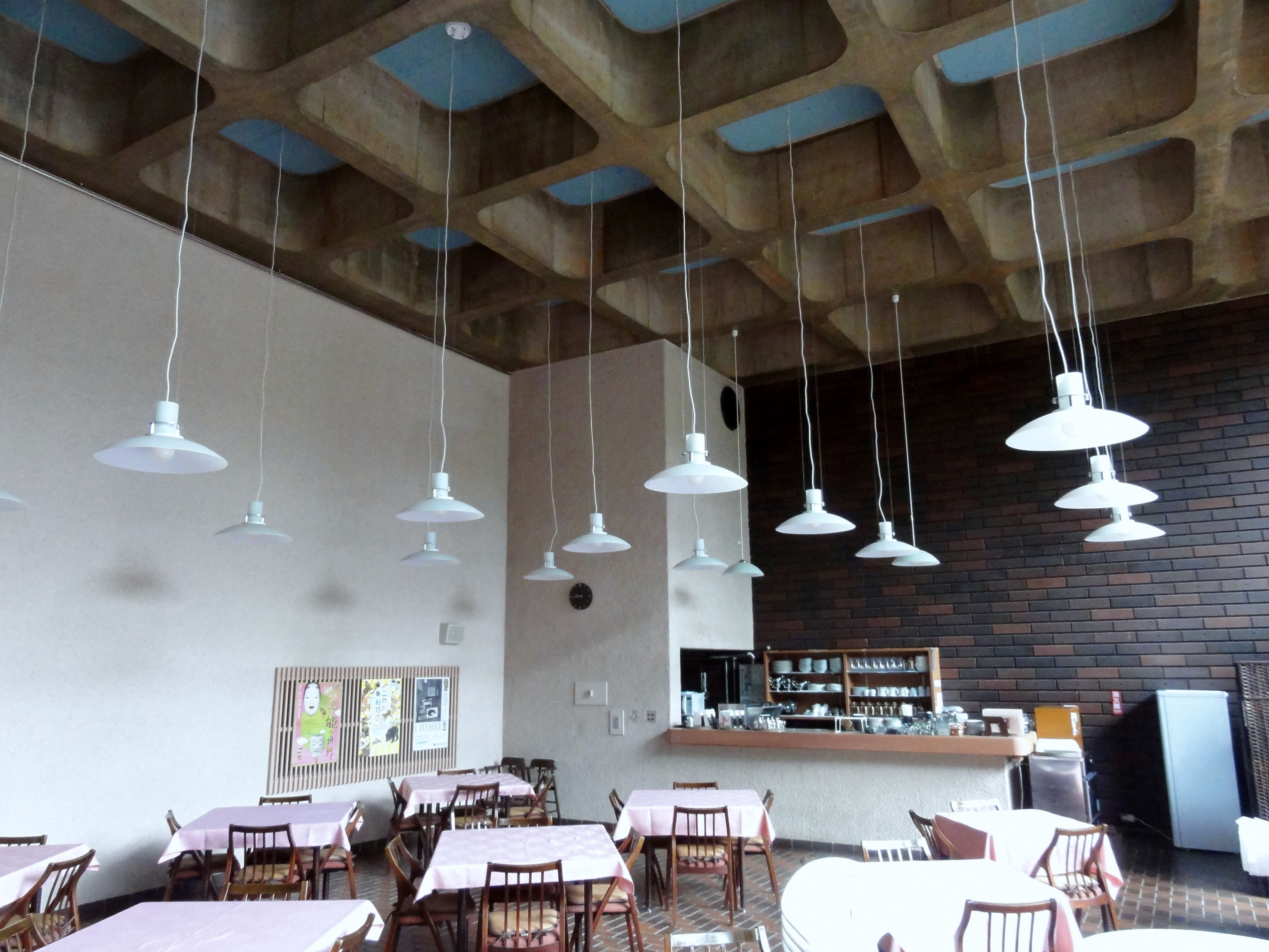 熊本県立美術館本館 喫茶室